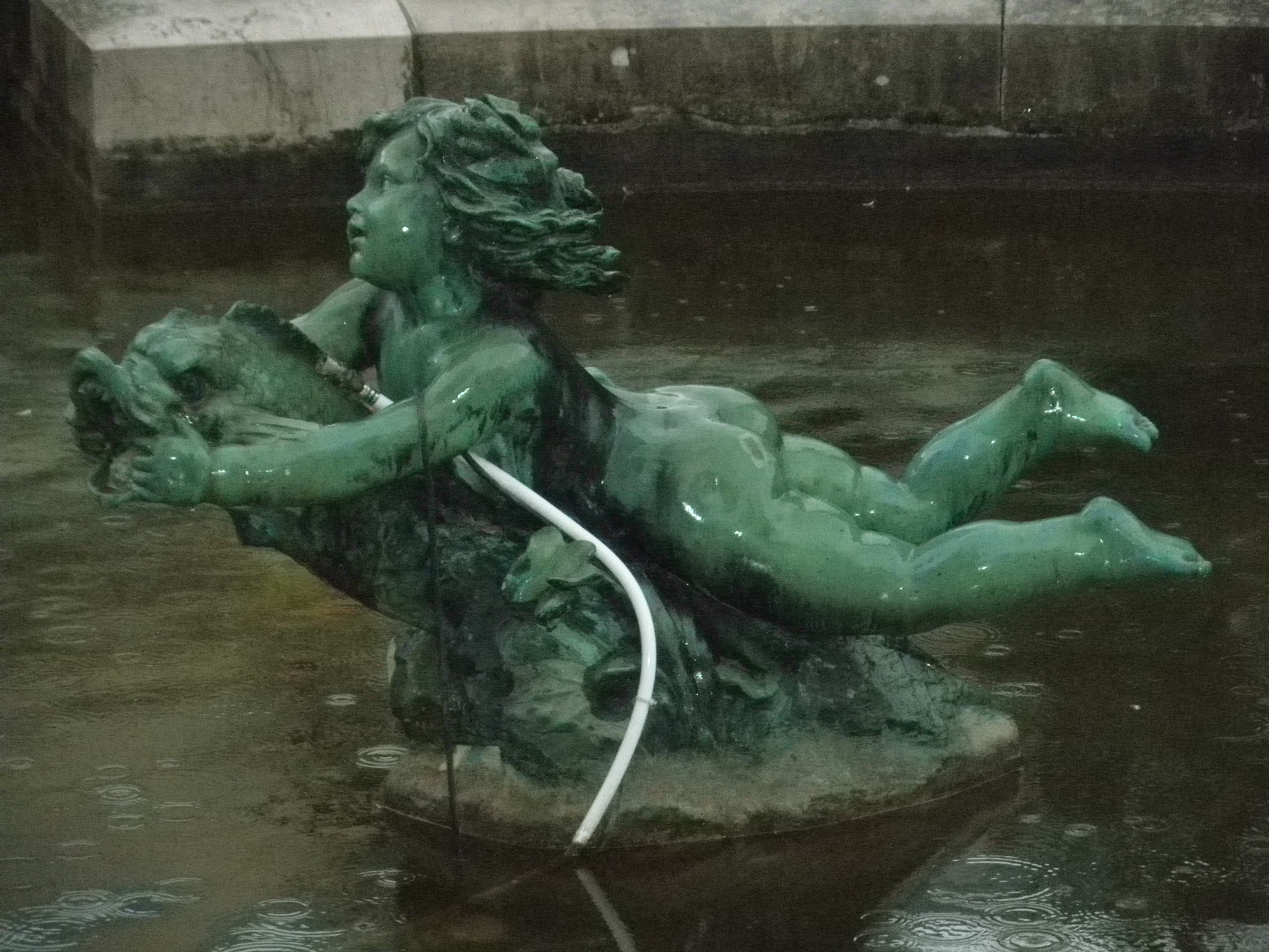 La rouvière en 2014